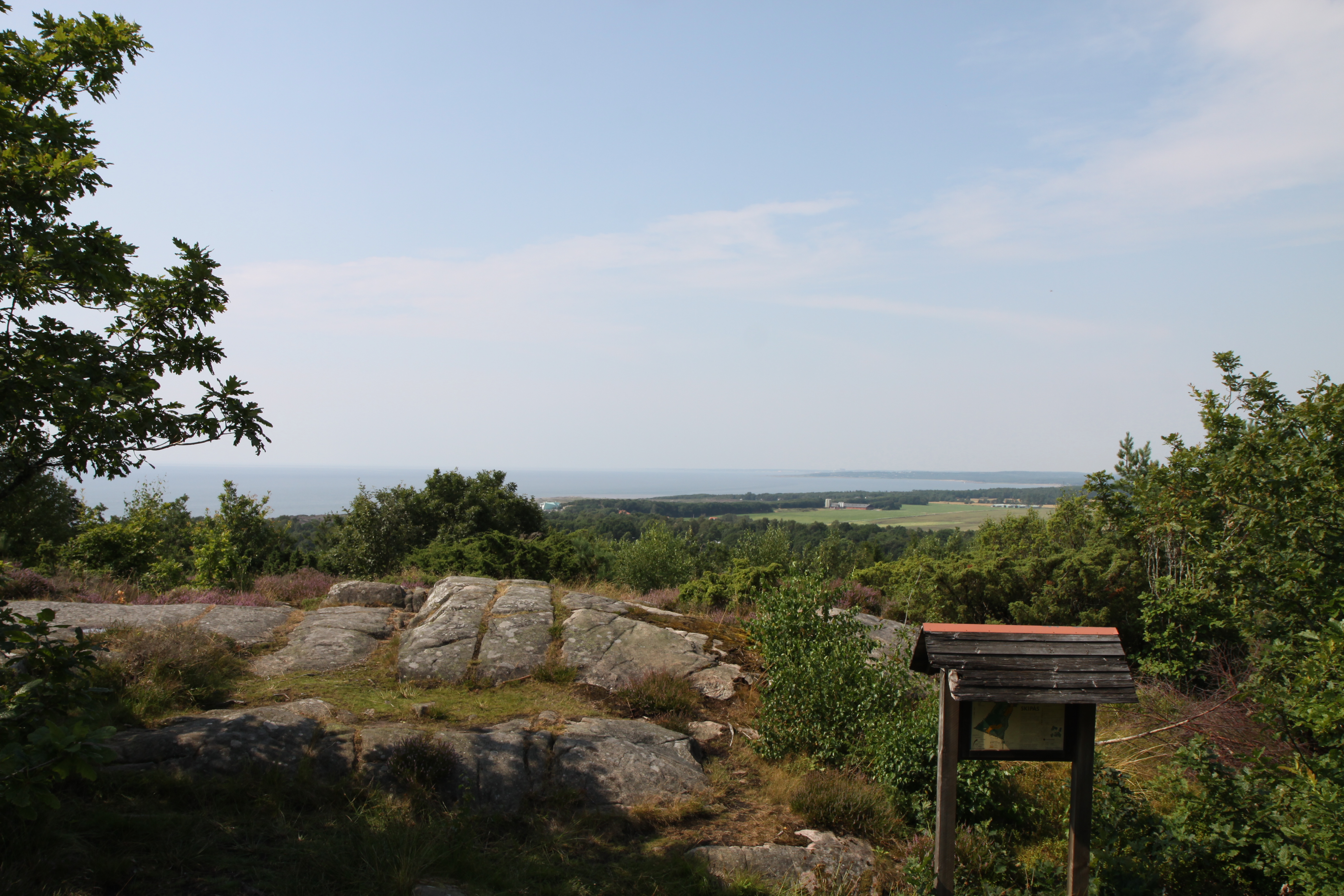 Utsikt från Klippekulle i Skipås naturreservat.